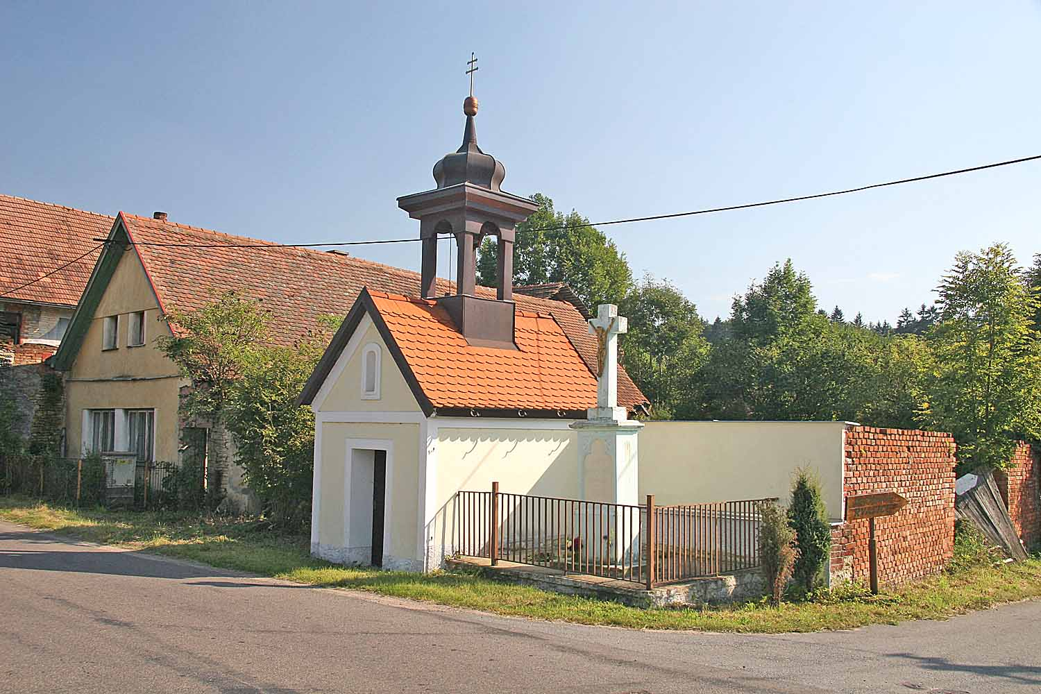 Kaplička a boží muka ve vsi Bílý Kůň, district Chrudim, Czech Republic autor:Prazak date: 14. 9. 2006